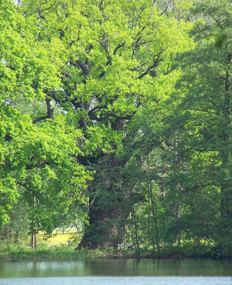 Rieseneiche (Quercus sp.) am Ziegelteich von Niedergurig, Landkreis Bautzen, Sachsen